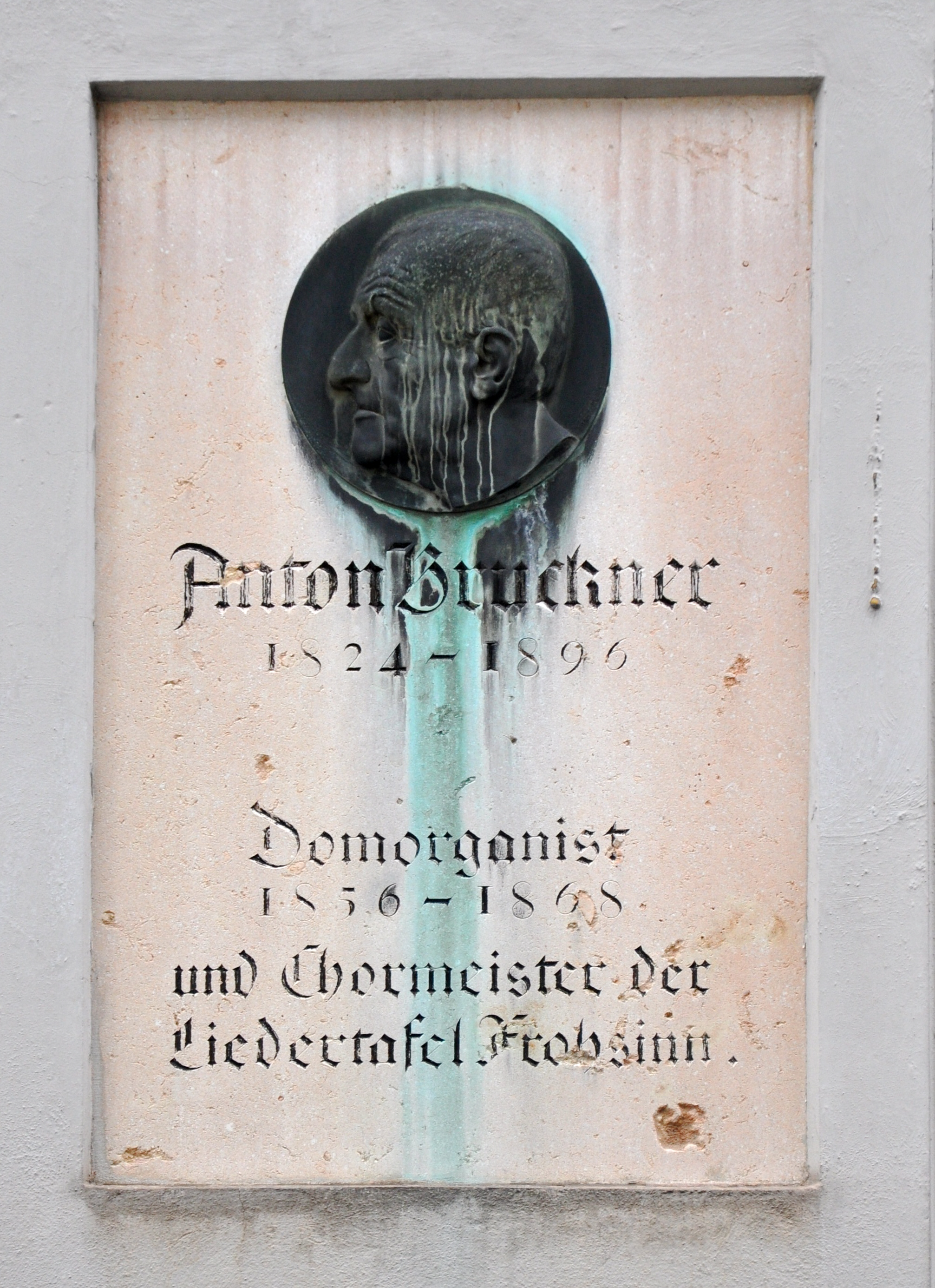 Linz, Alter Dom, Gedenktafel für Anton Bruckner